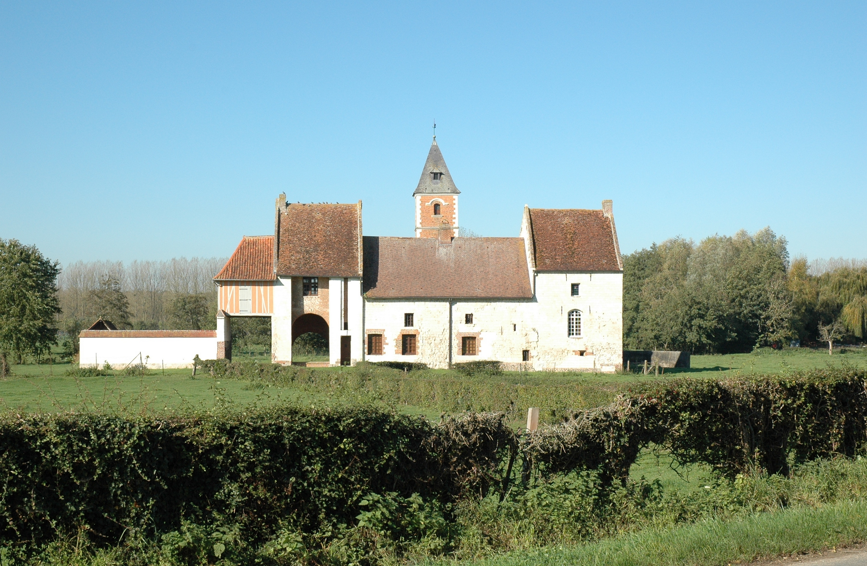 Le manoir dont le début de la construction est daté de XVI siècle